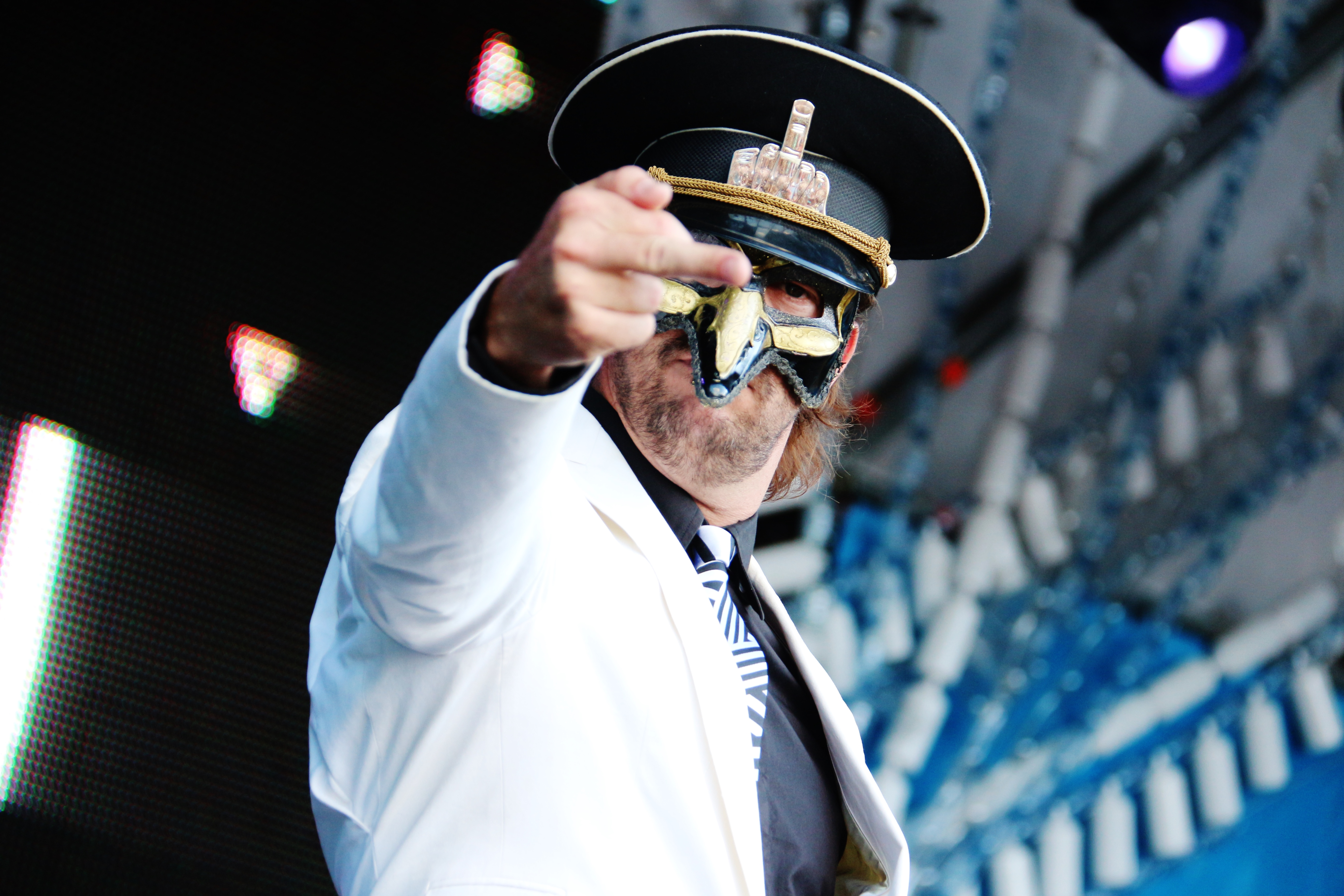 Bernd Gansebev van 'De Kraaien' op Solar Weekend Festival 2013